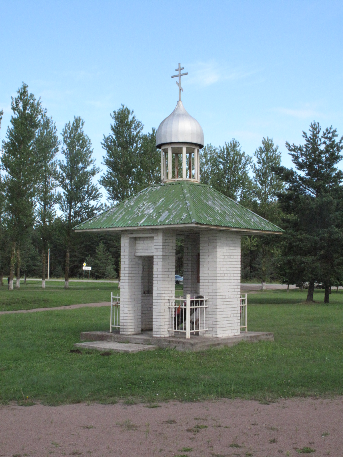 Часовня Георгия Победоносца. Мемориал "Невский пятачок".